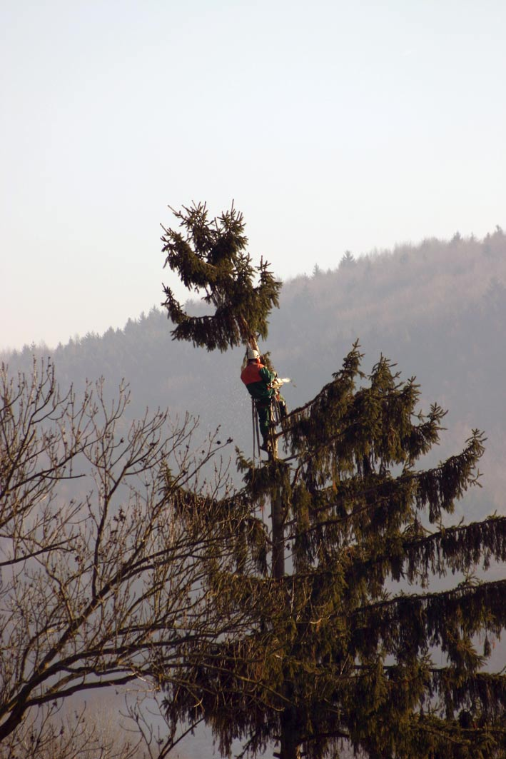 Fälltechnik eines Baumes in bebauter Umgebung